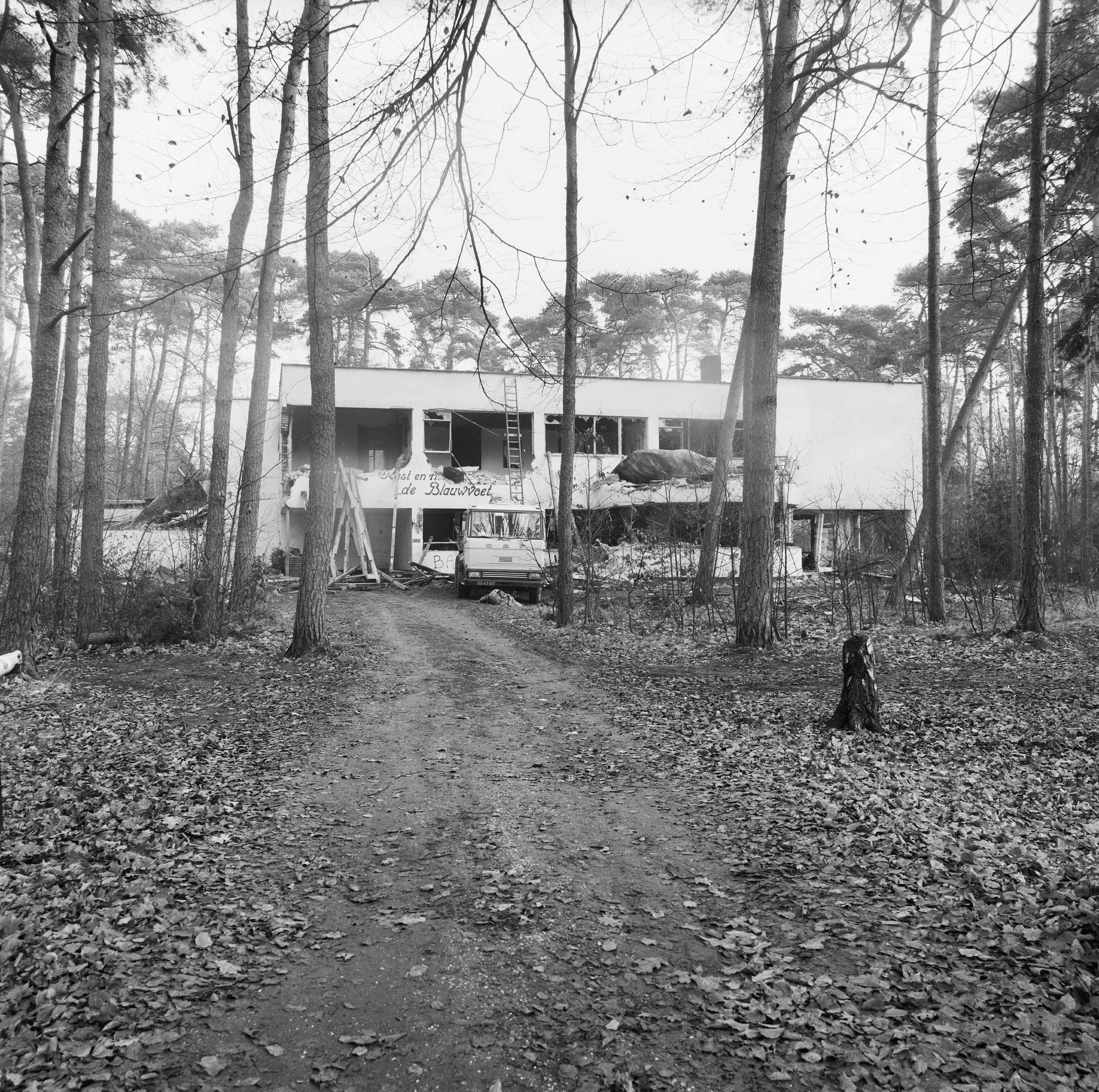 De Blauwvoet" overzicht